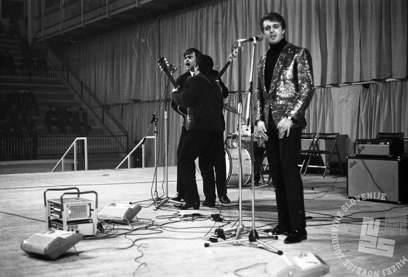 Matt Collins oz. Zagrebčan Karlo Metikoš v ljubljanski Hali Tivoli.